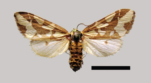 Tessellota cancellata